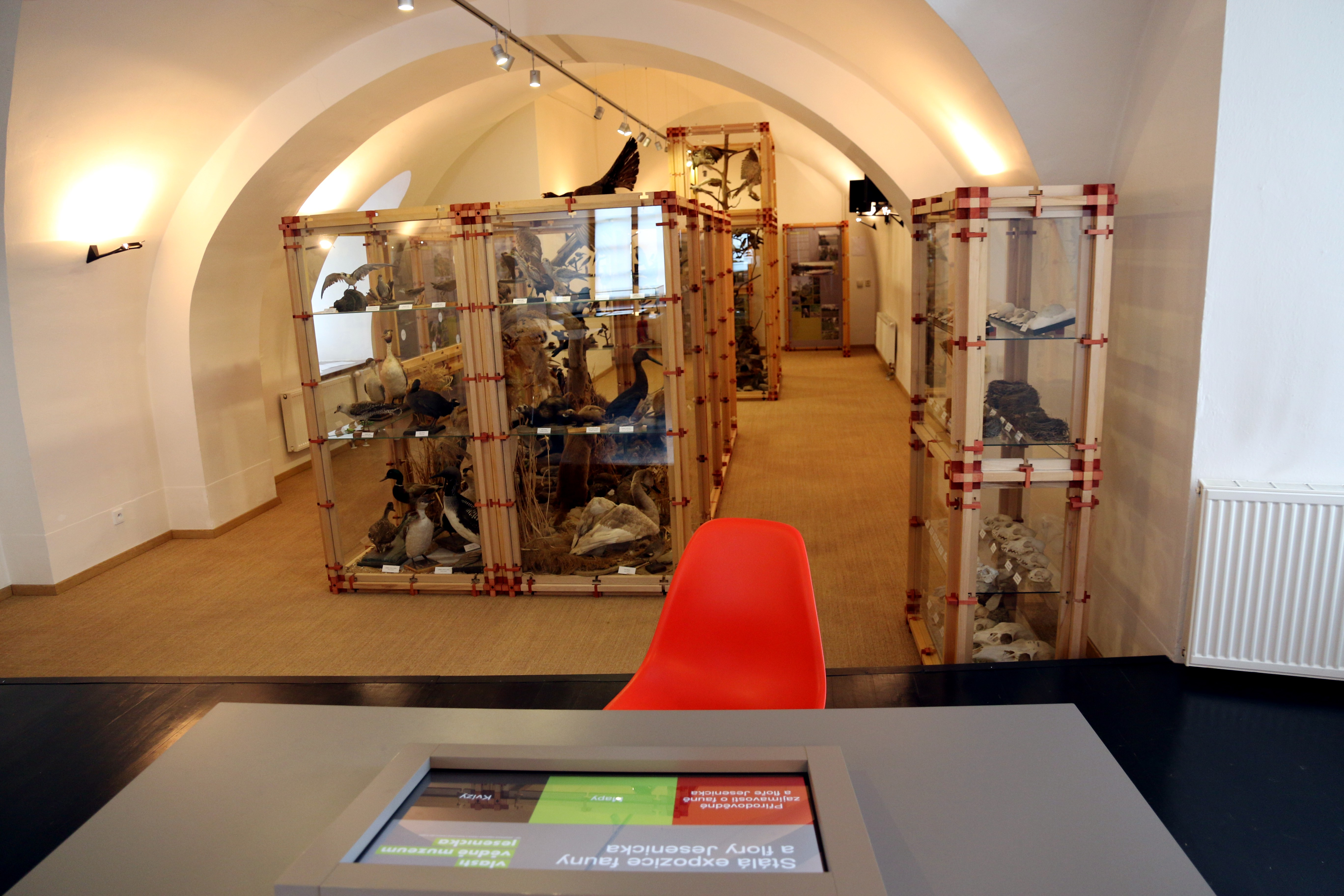 Exposition of nature (Museum of Jeseník Region)